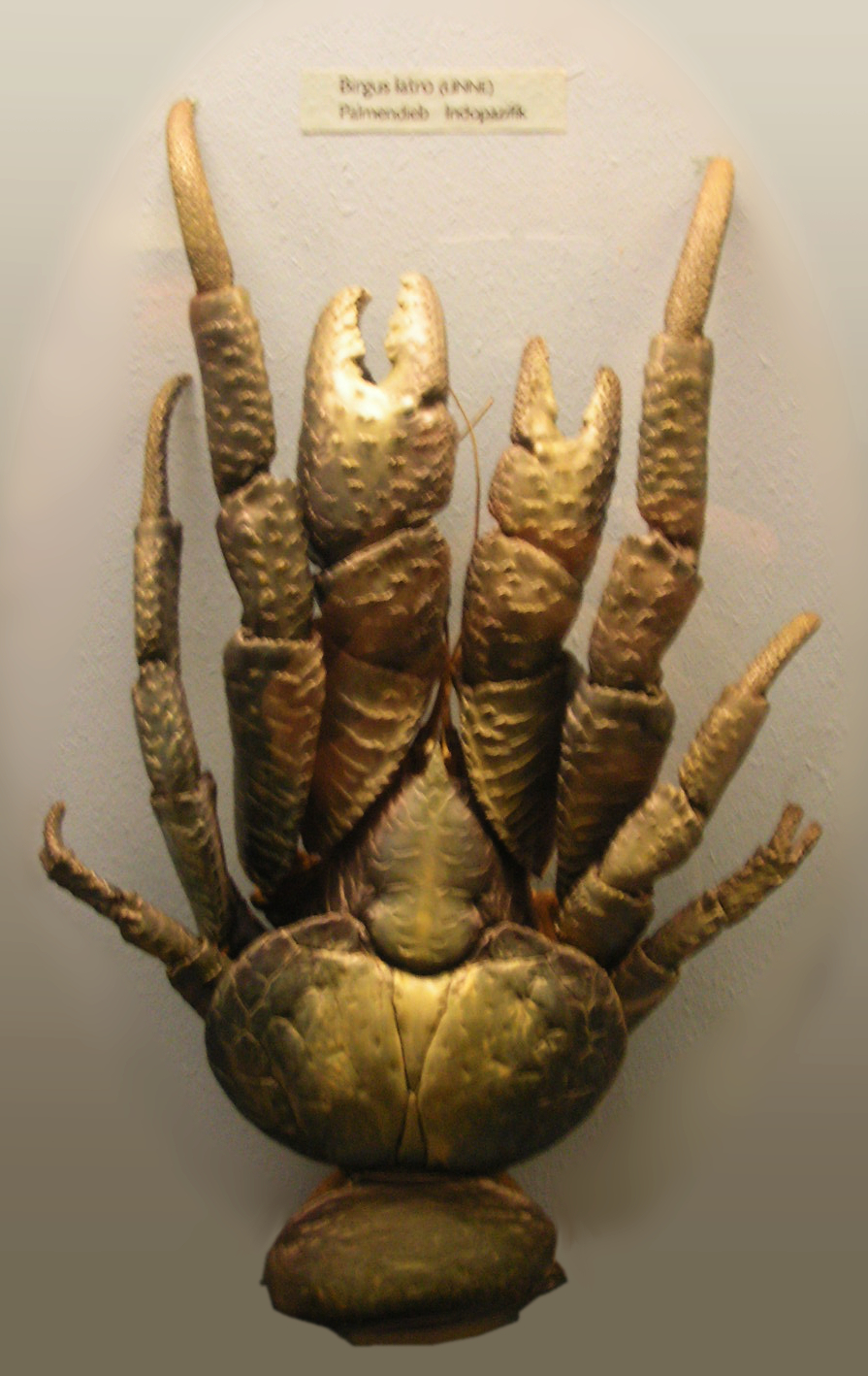 Birgus latro, Naturhistorisches Museum in Vienna